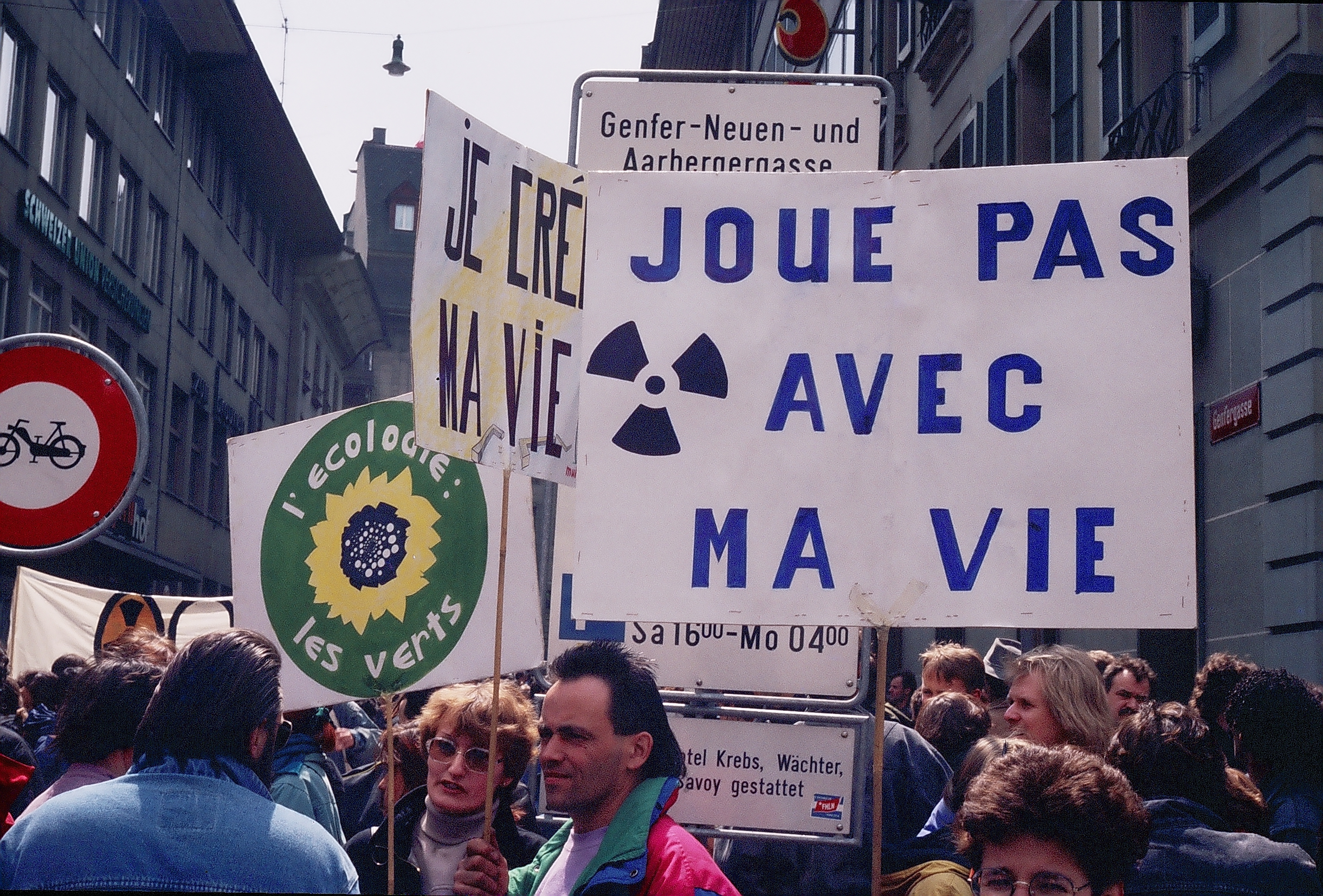 « Joue pas avec ma vie » : manifestation contre Superphénix, Berne, Suisse, 1989.